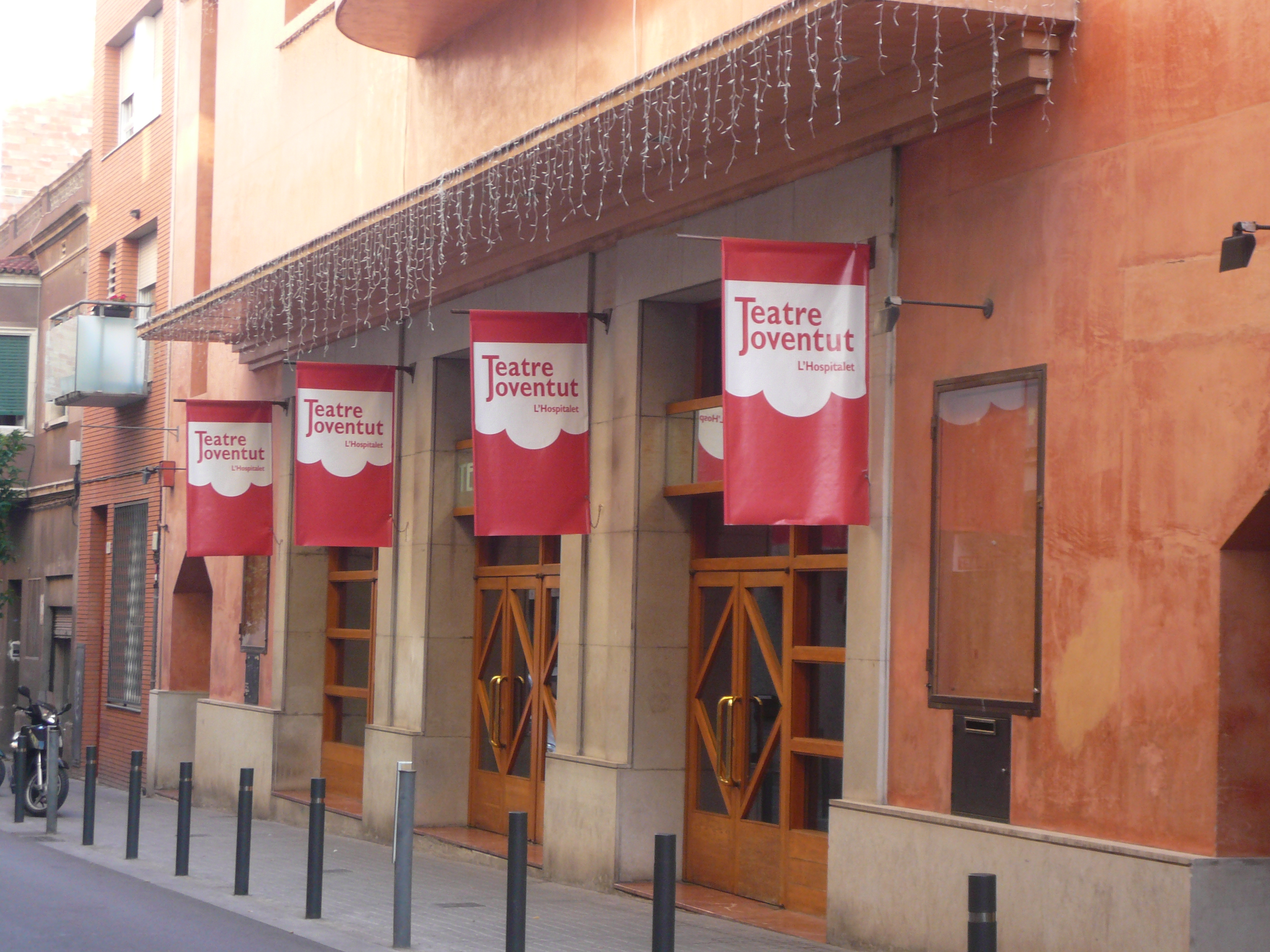 Teatre Joventut (l'Hospitalet de Llobregat) Object location41° 22′ 21″ N, 2° 07′ 04.3″ E